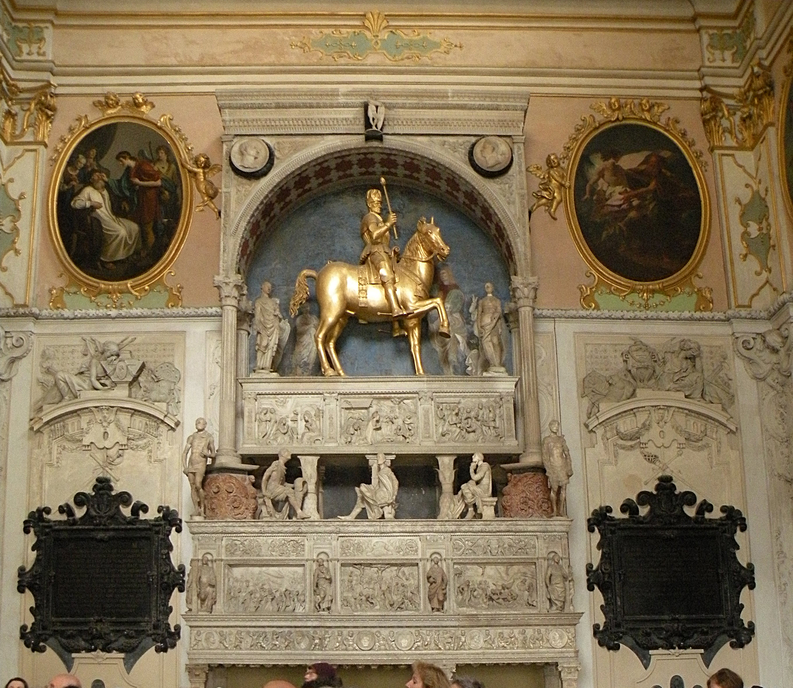 Гробница Коллеони в Бергамо